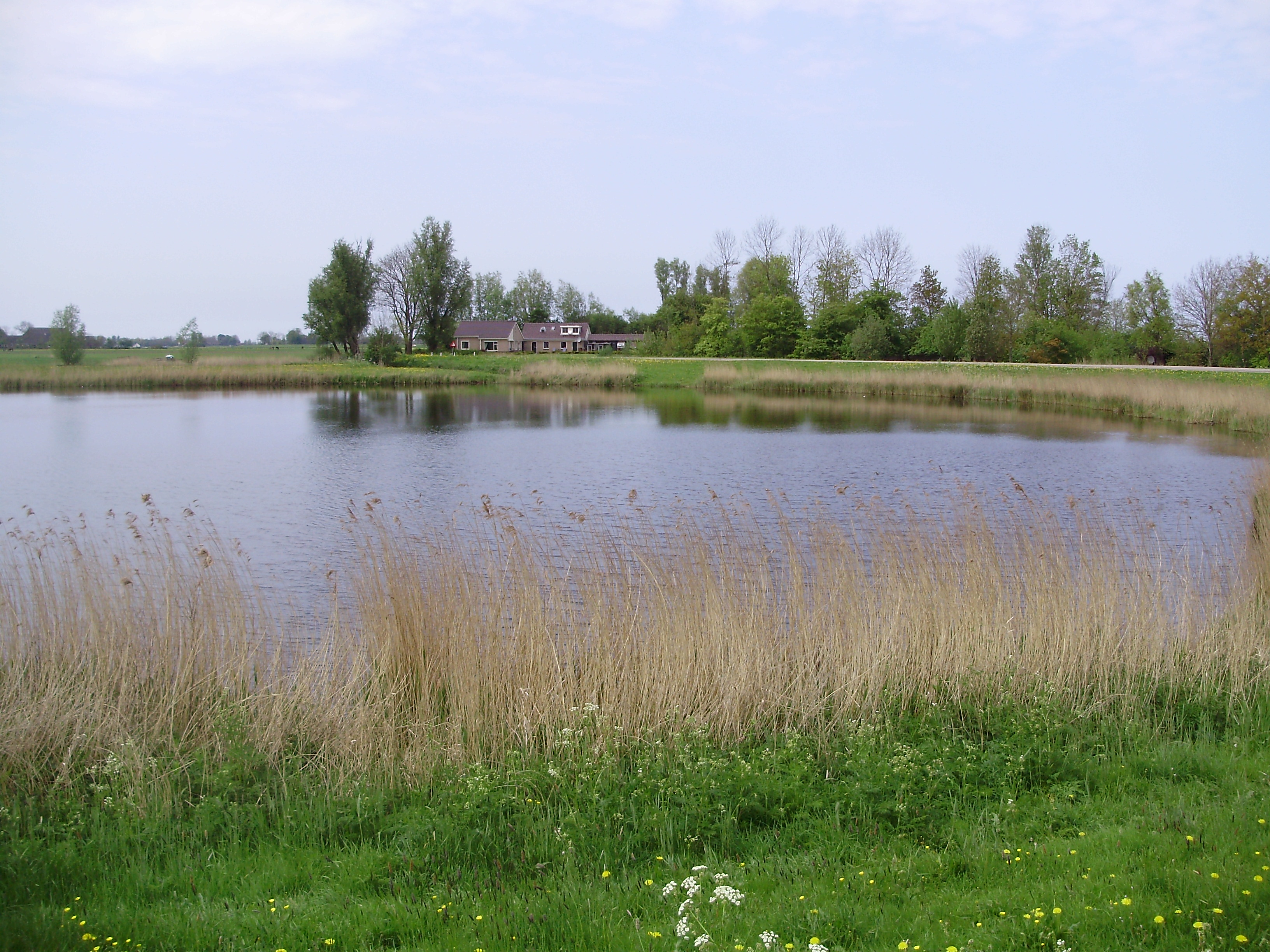 Het Mallegraafsgat in gemeente Kollumerland c.a. (prov. Friesland, Nederland)